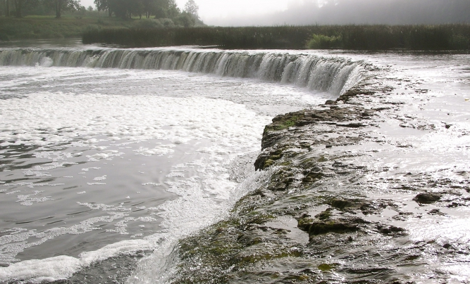 Водопад на реке Венте